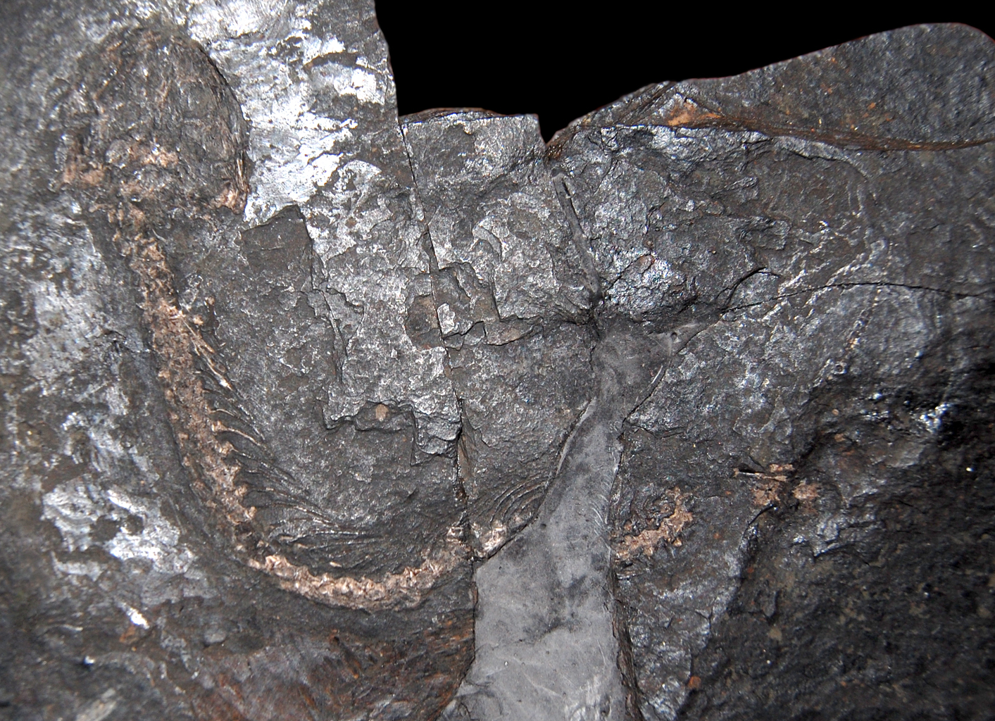 Naturhistorisches Museum Wien